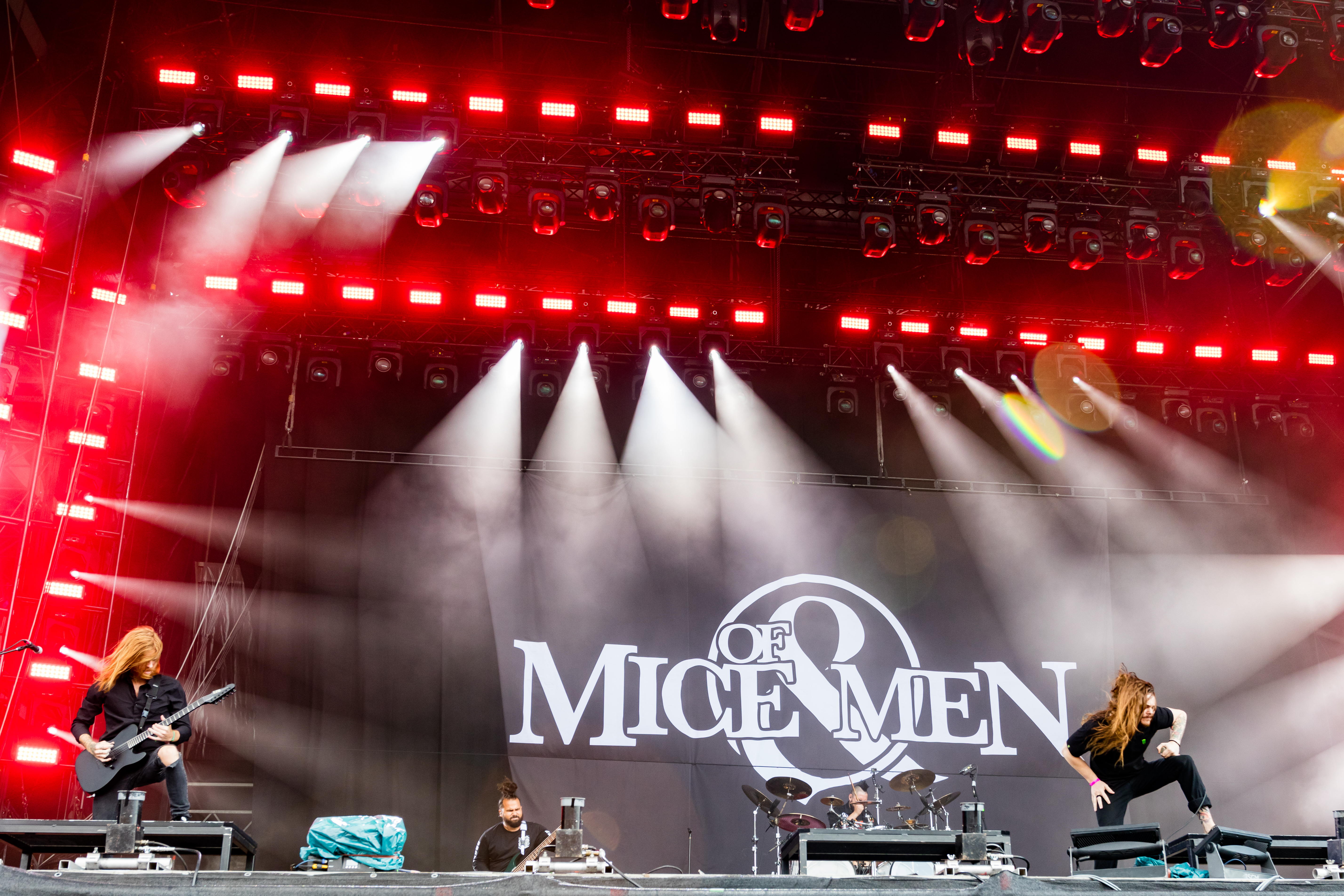 Of Mice & Men during Wacken Open Air at The Holy Wacken Land, Wacken, Schleswig-Holstein, Germany on 2019-08-03, Photo: Sven Mandel